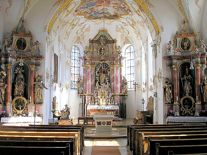 Pfarrkirche Mariä Himmelfahrt (Türkenfeld, Landkreis Fürstenfeldbruck, Oberbayern). Innenansicht nach Osten. Eigene Aufnahme, Febr. 2007 / Parish church "Assumption of Mary" (Tuerkenfeld near Fuerstenfeldbruck, Upper Bavaria, Germany). Interior, looking east. Own photo, Febr. 2007